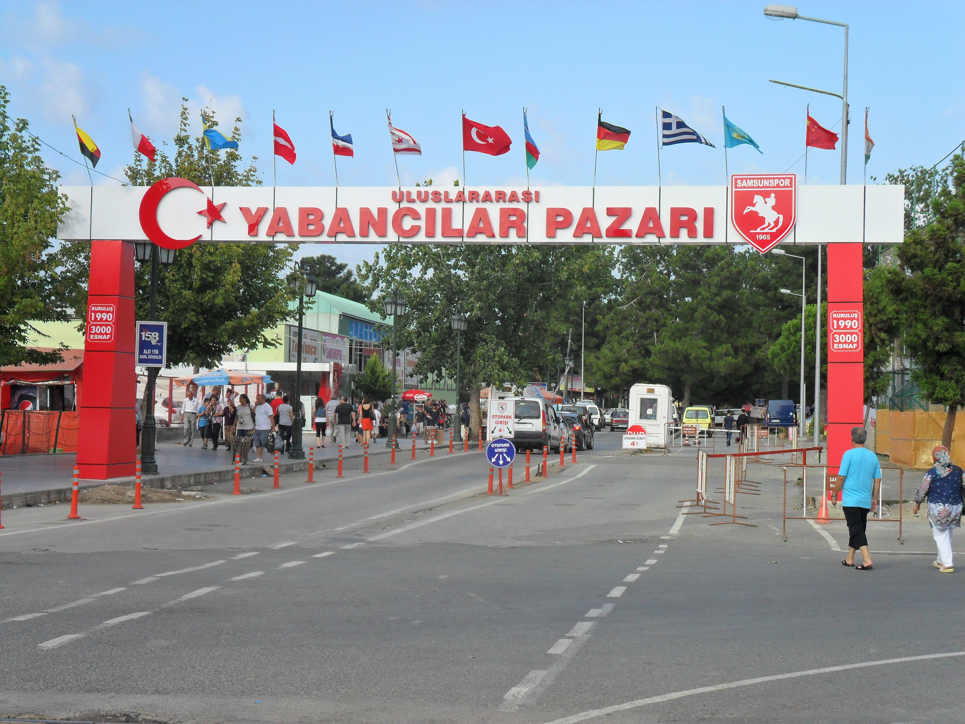 Uluslararası Yabancılar Pazarı araç giriş kapısı.